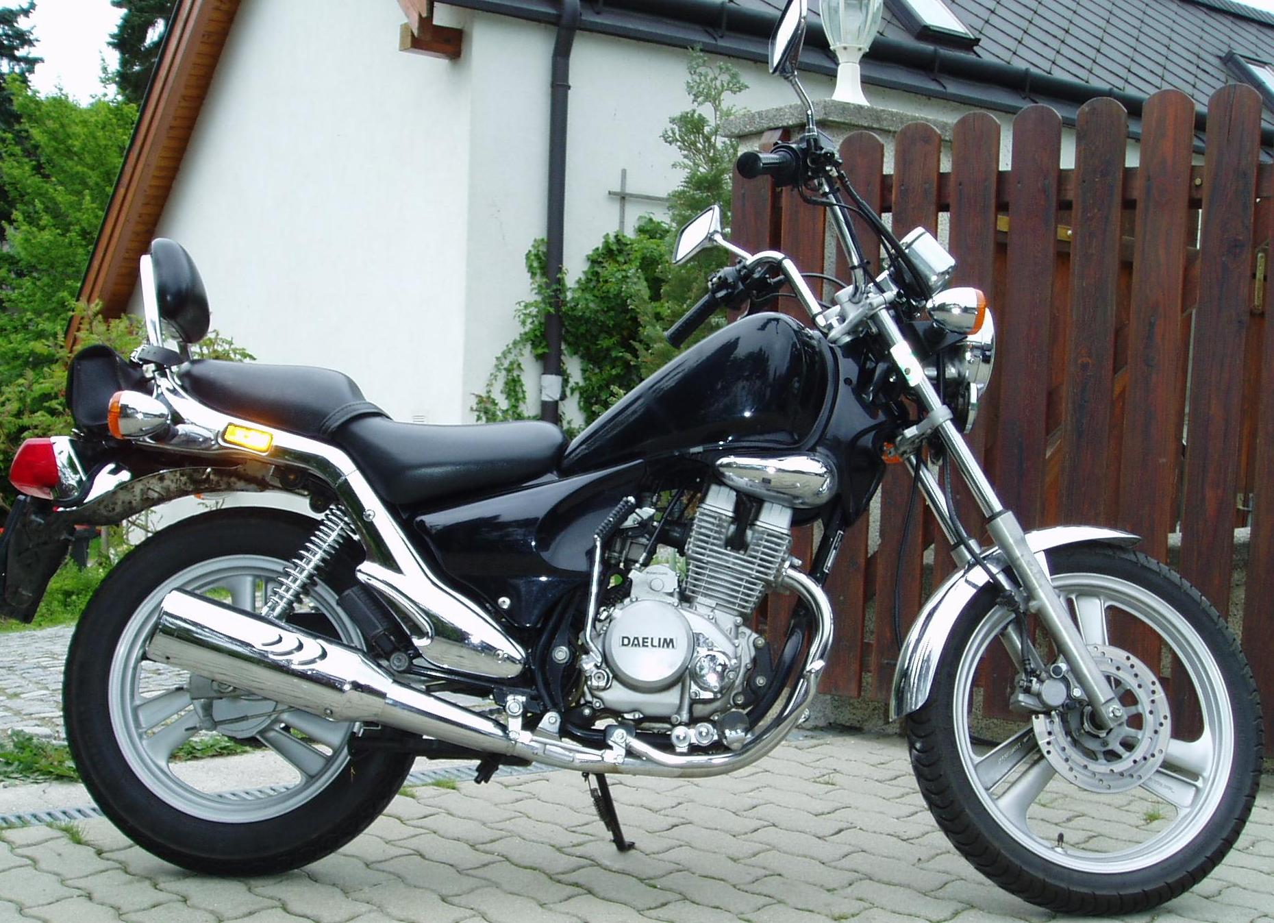 Daelim VS 125F